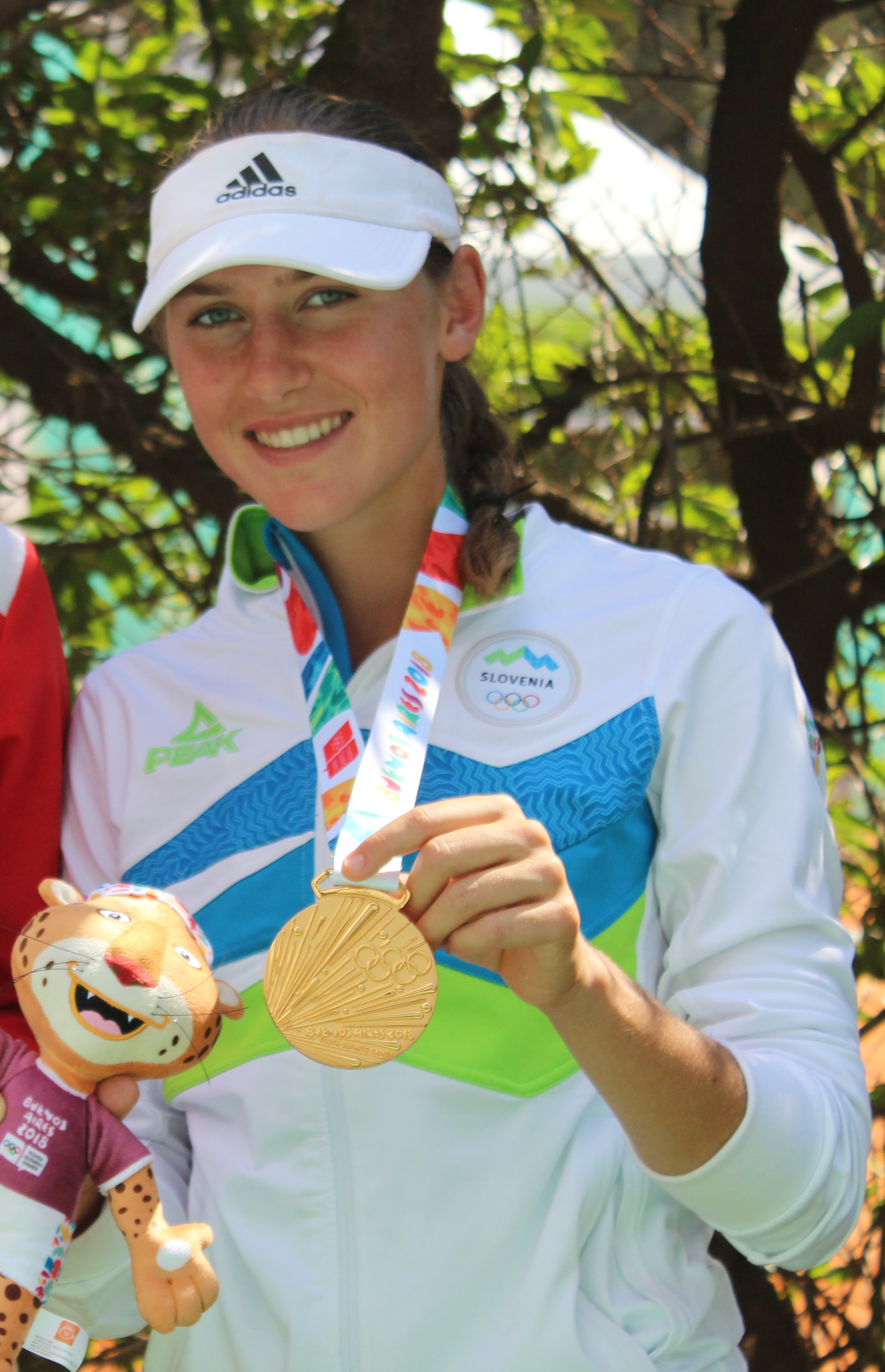 Medallistas en tenis dobles femenino.